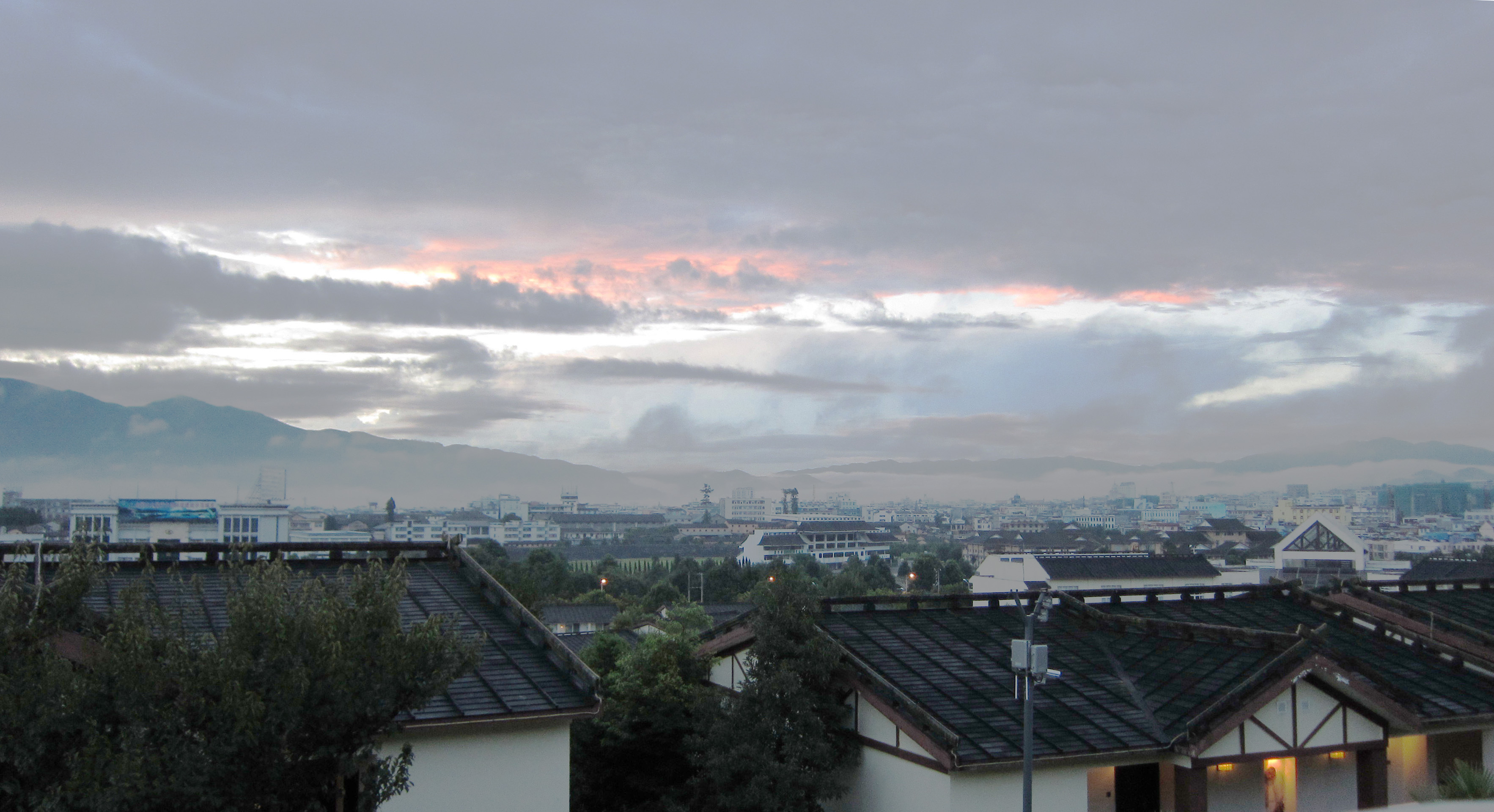 乱云飞渡----高原的朝霞 dawn, Tengchong